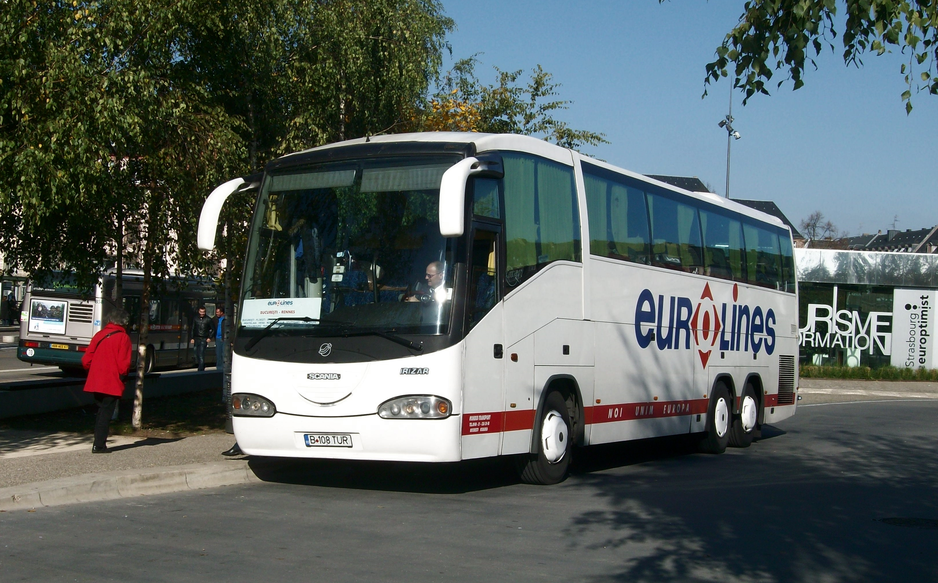 Car Eurolines déchargeant ses passagers sur la dépose autocar de Strasbourg